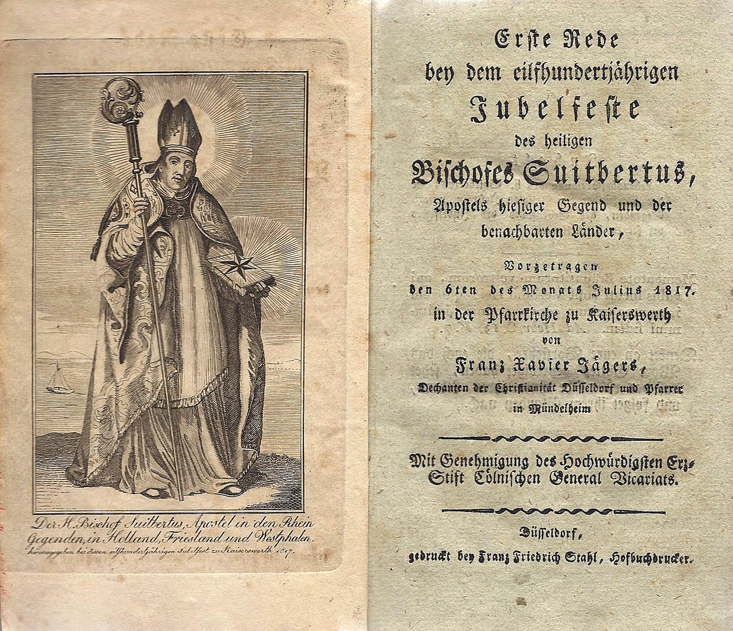 Seite 2 und 3 der acht Reden beim elfhundertjährigem Jubelfest von Suitbertus